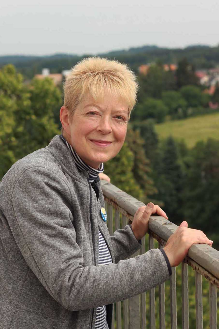 Eva Heyd